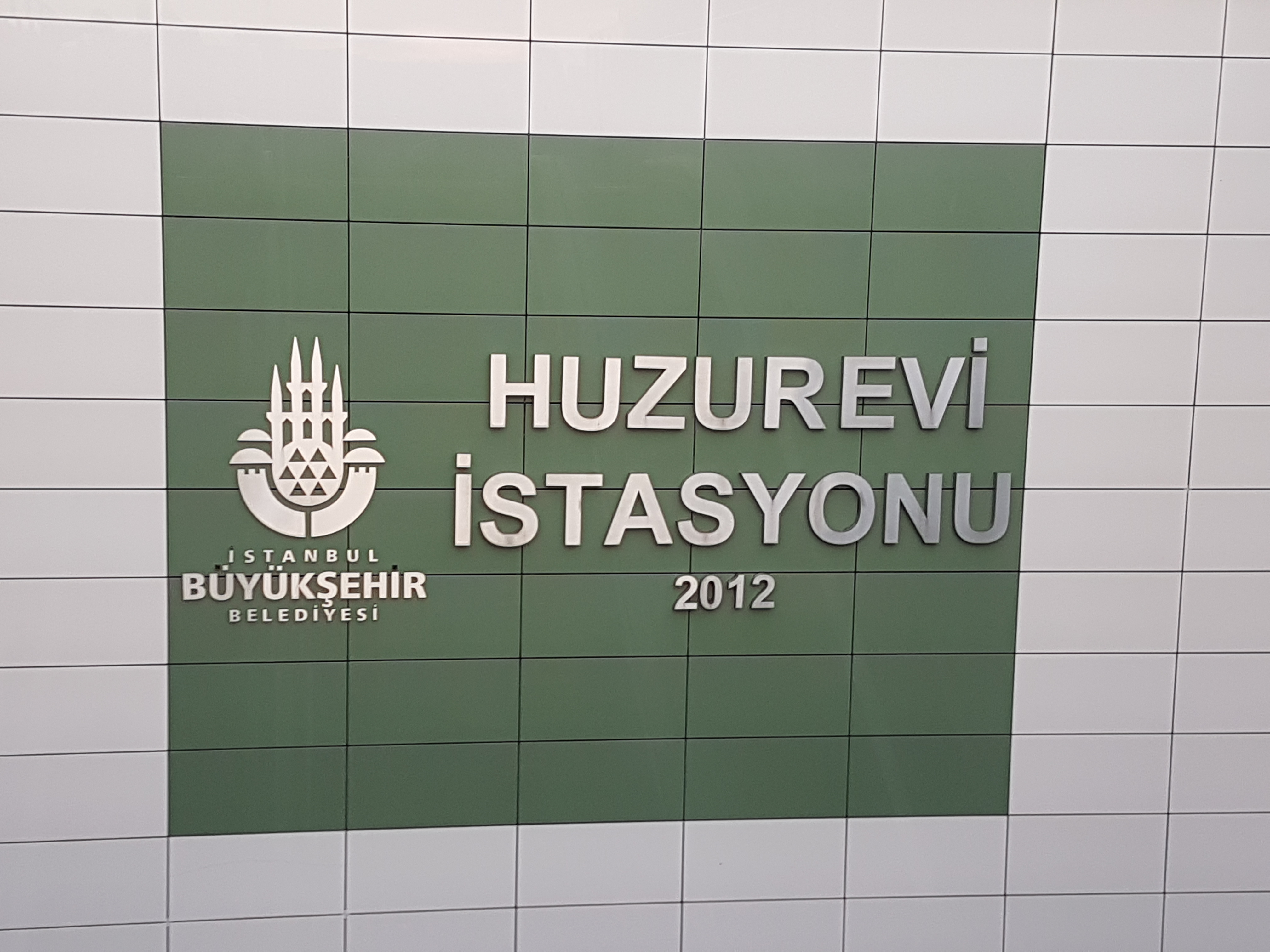 M4 hattı Huzurevi istasyonu giriş tabelası